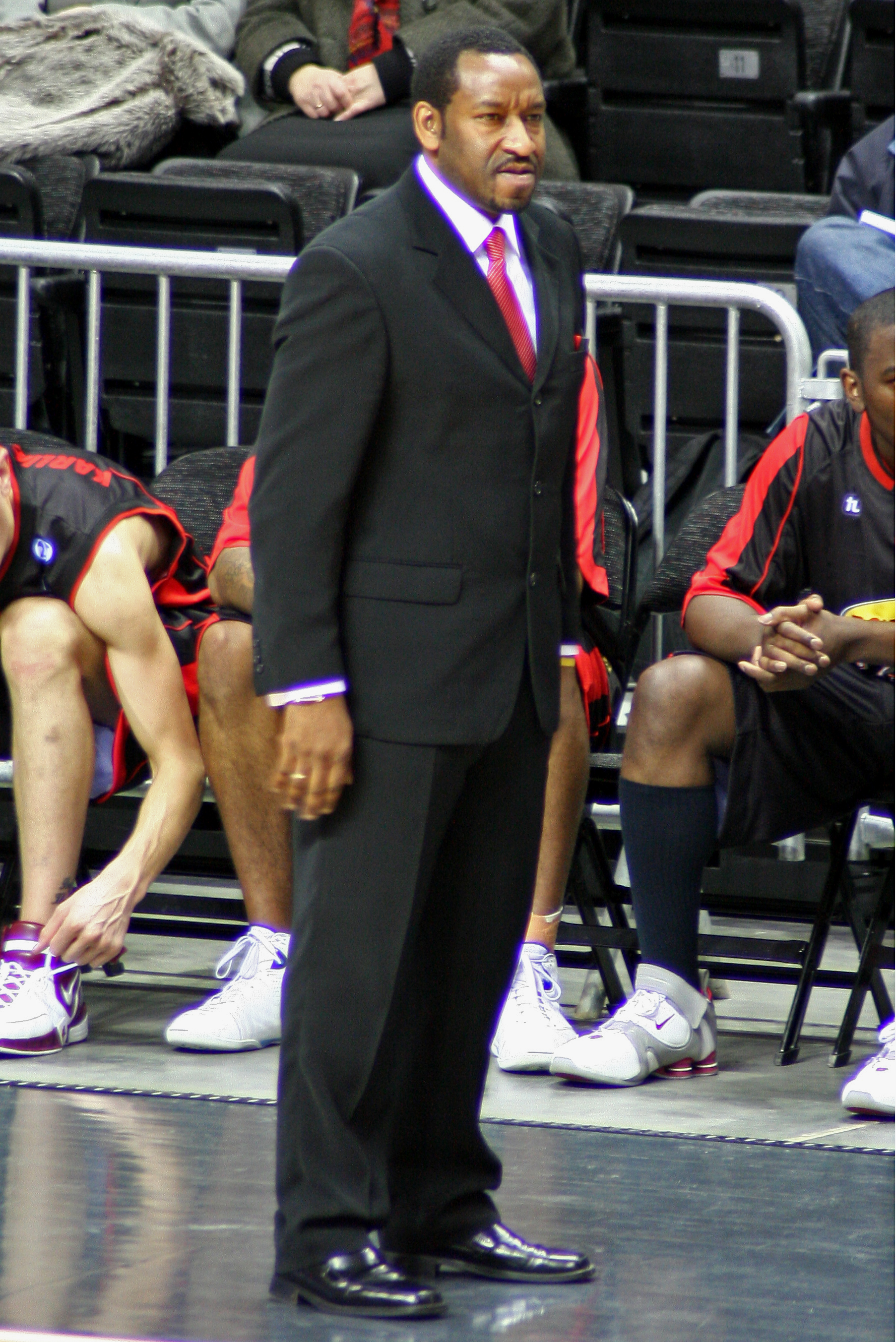 Paul Julian James